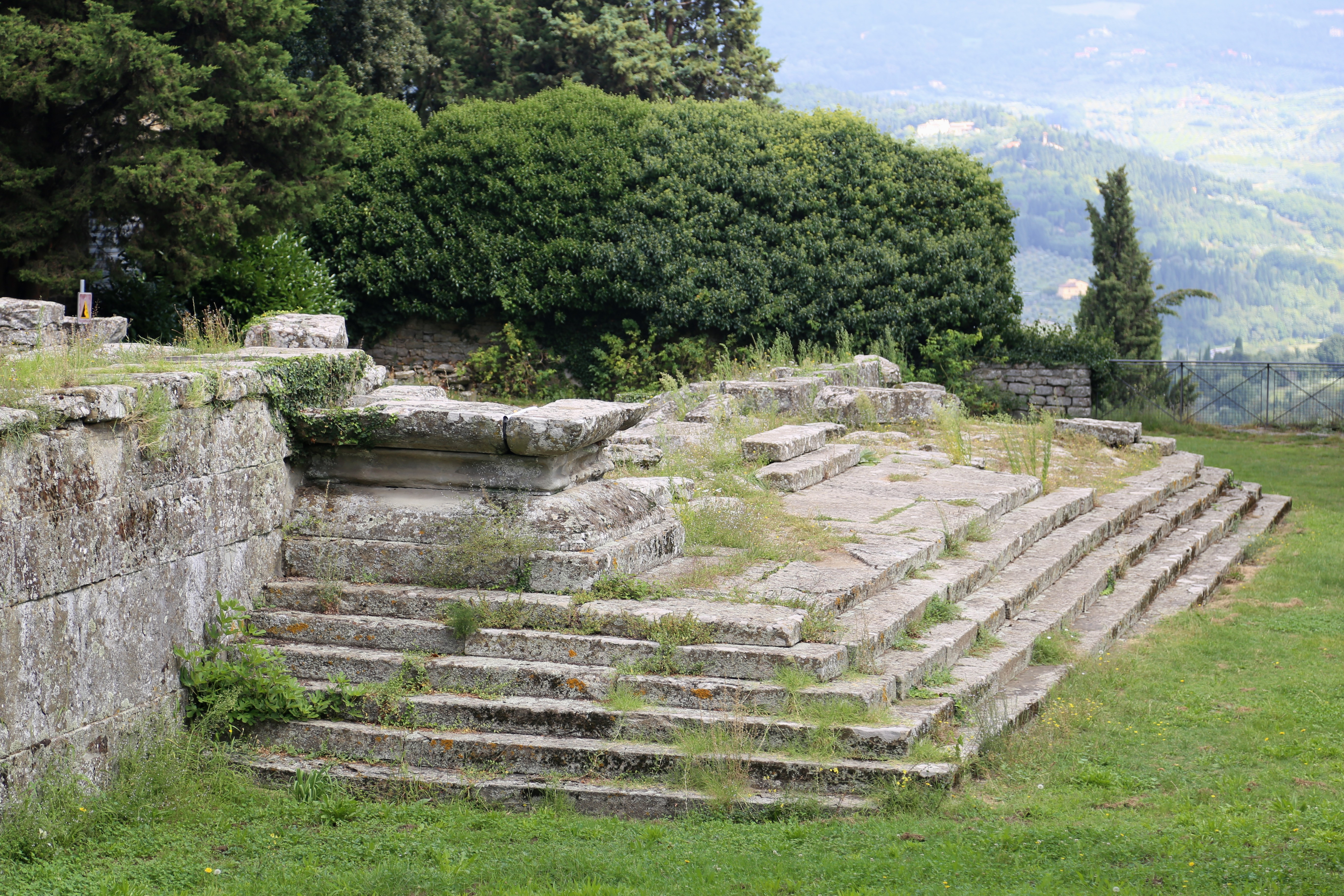 Etruskisch-Römischer Tempel, Zona Archeologica, Fiesole